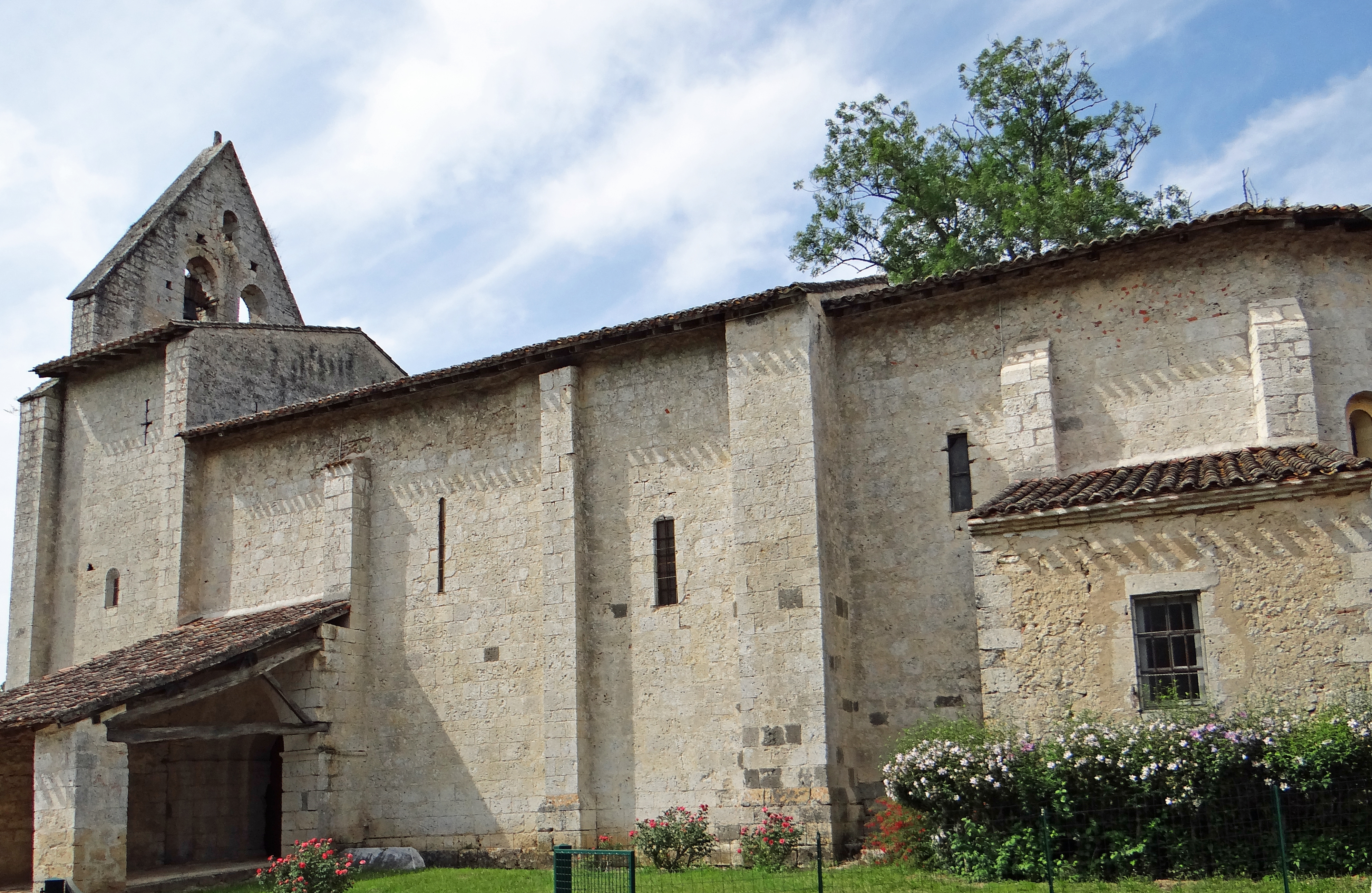 Saint-Pierre-de-Buzet - Église Saint-Pierre - Ensemble côté sud